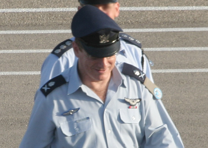 Israeli Air-Force Chief, Aluf Eliezer Shkedy